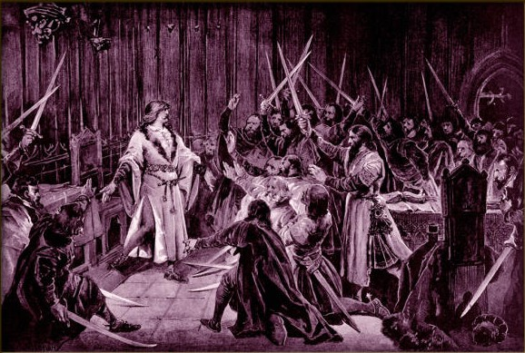 Adolf Liebscher - Volba Jiříka z Poděbrad za krále českého na radnici staroměstské dne 2. března r. 1458